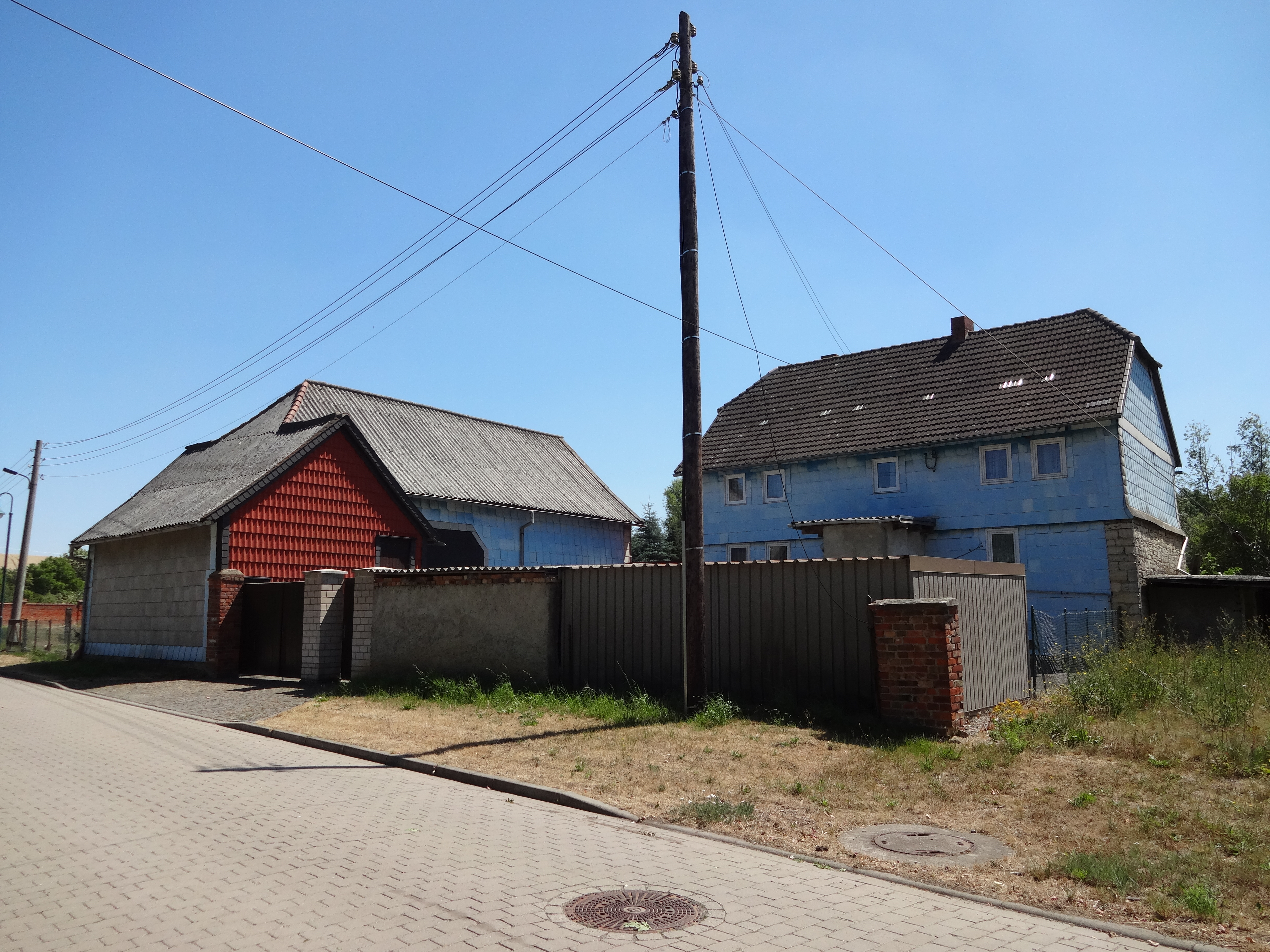 denkmalgeschützte ehemalige Mühle in der Hüttenstraße 6 in Dedeleben